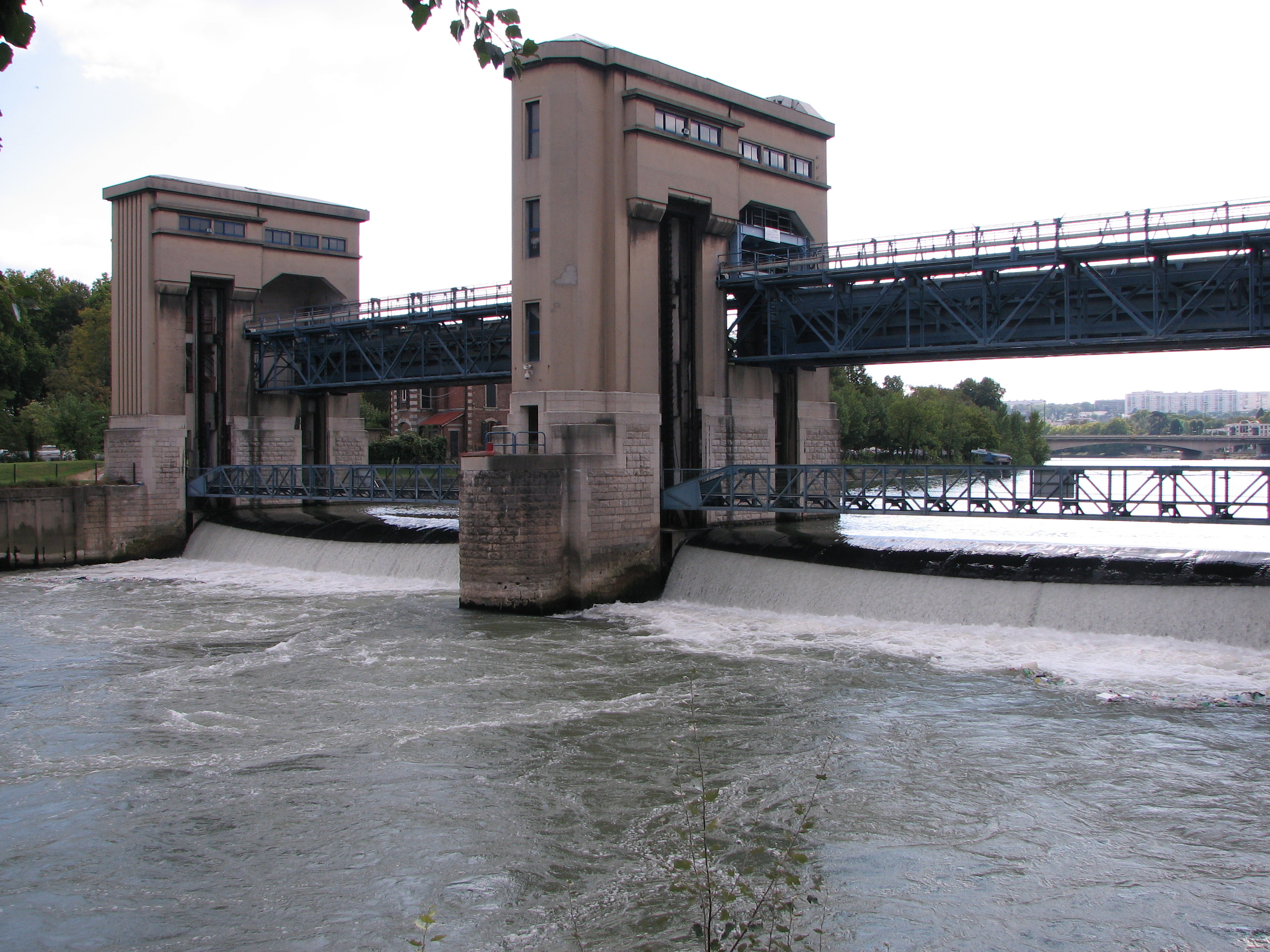 Ecluses de Suresnes entre l'île de Puteaux et la rive du bois de Boulogne. Suresnes sluices between île de Puteaux and bois de Boulogne riverside (Paris) on the Seine river.